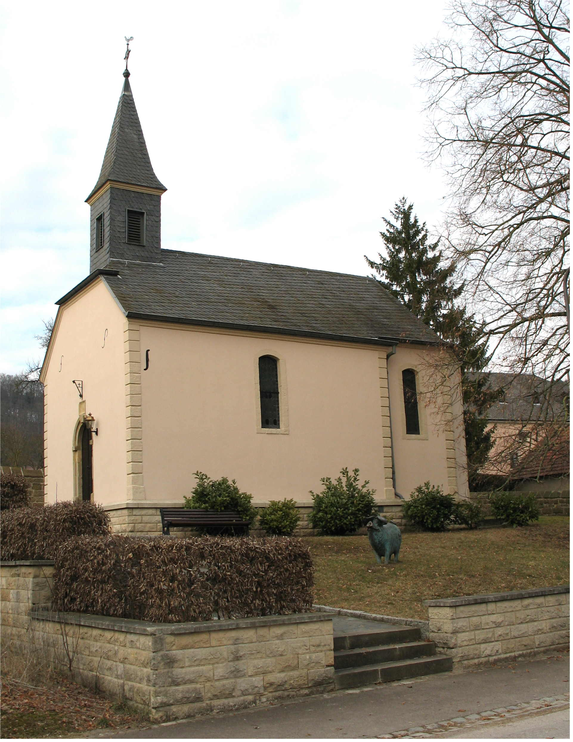 Sujet : Kierch zu Rippeg Source : Eege Foto Johnny Chicago (MÃ¤erz 2006) Lizenz